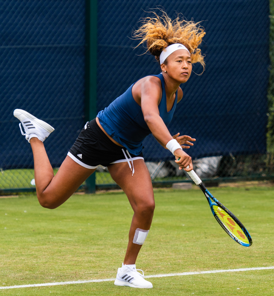 Naomi Osaka